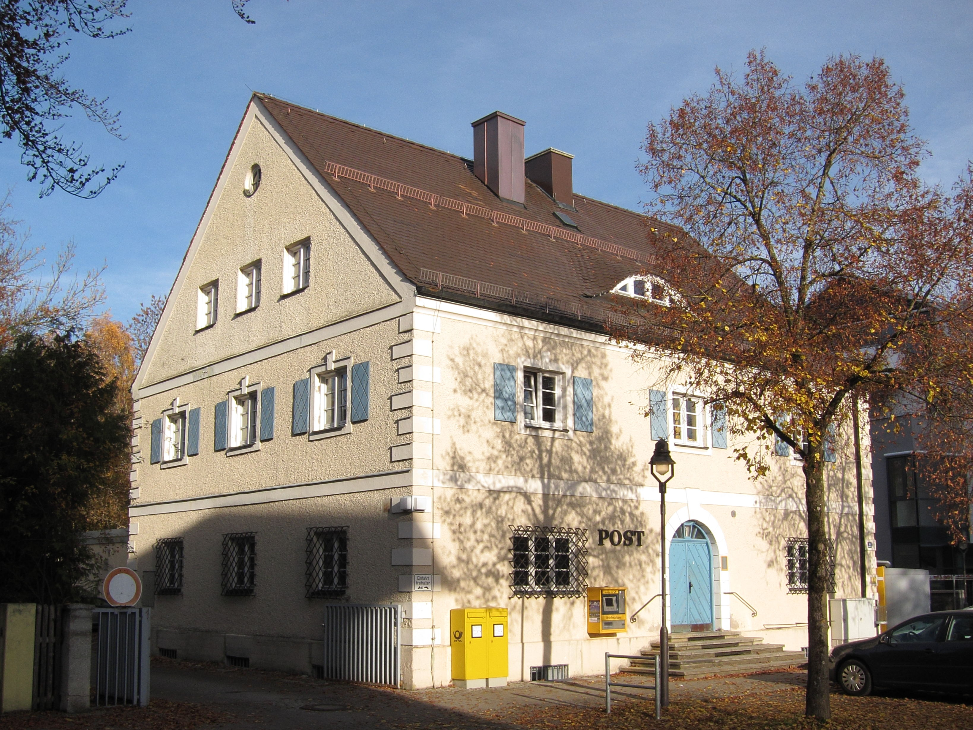 Bahnhofstraße 36, Postamt, zweigeschossiger Satteldachbau mit Putzgliederungen im Stil der bayerischen Postbauschule von Robert Vorhoelzer und Fritz Norkauer, 1925.